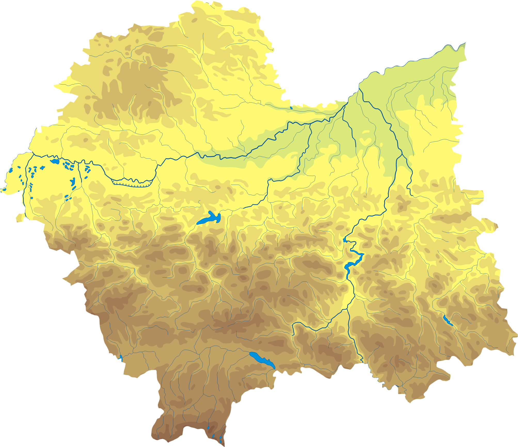 Mapa wód i ukształtowania powierzchni województwa małopolskiego. Autor: AotearoaWspółrzędne graniczne mapy: N: 50.5205° N S: 49.1785° N W: 19.0832° E E: 21.4219° E Legenda